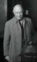 Hendrik Willem Tilanus in 1956